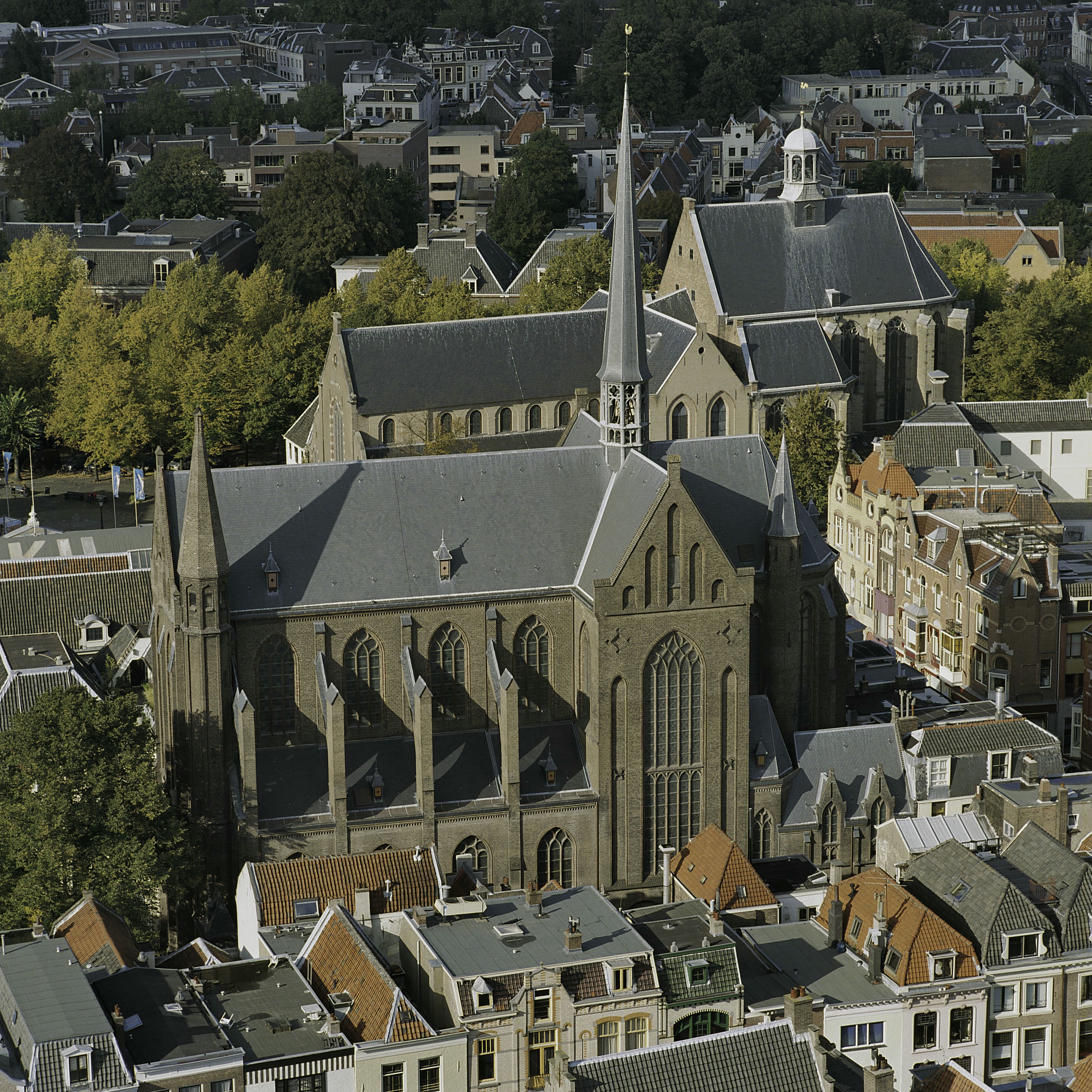 Sint Willibrorduskerk: Overzicht Sint Willibrorduskerk vanaf de domtoren (opmerking: Boek: "66 Kanjermonumenten")